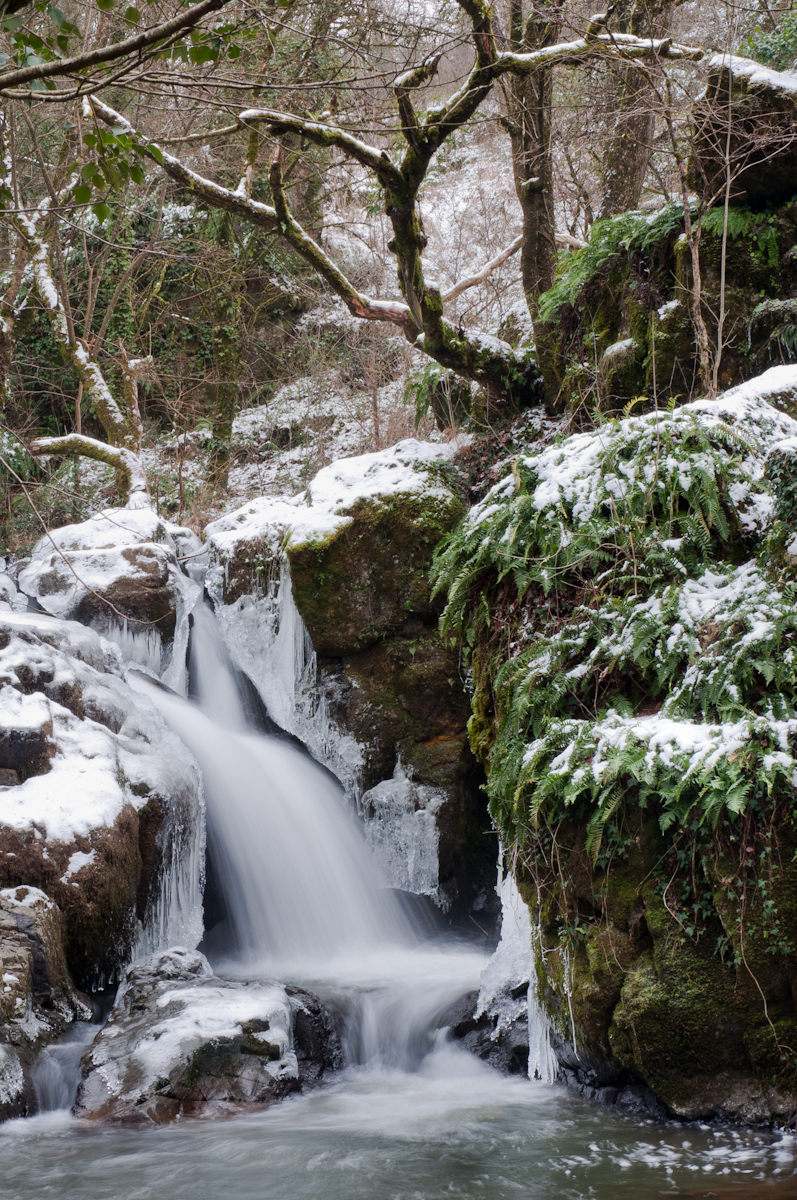 Cascade du puits d'enfer sous la neige, située sur la commune d'Exireuil.